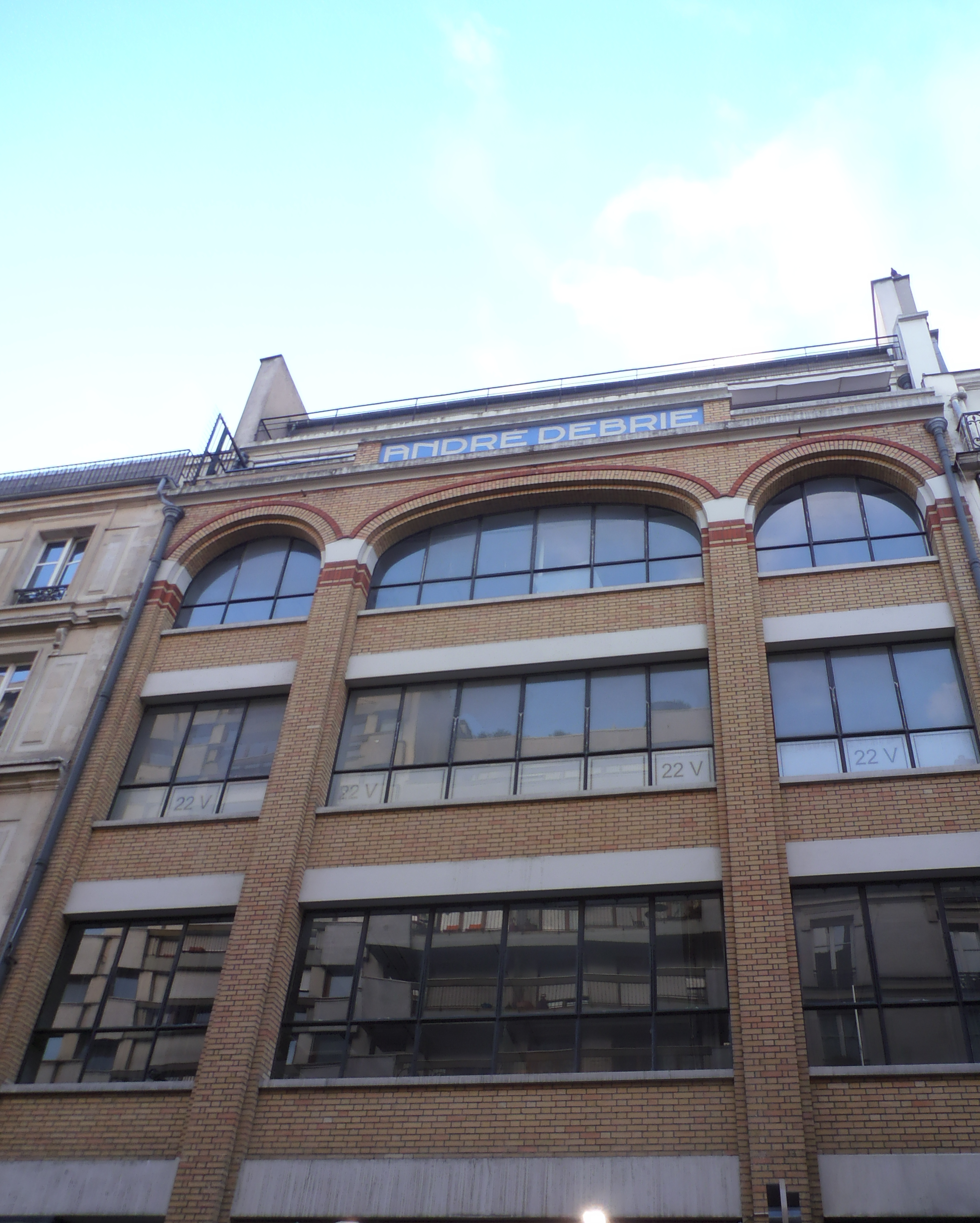 Quartier Oberkampf, Paris. Bâtiment qui accueillait le fabricant André Debrie après 1927 : fabrication et vente en gros de matériel de cinéma et d'amplificateurs (une centaine d'employés en 1984).